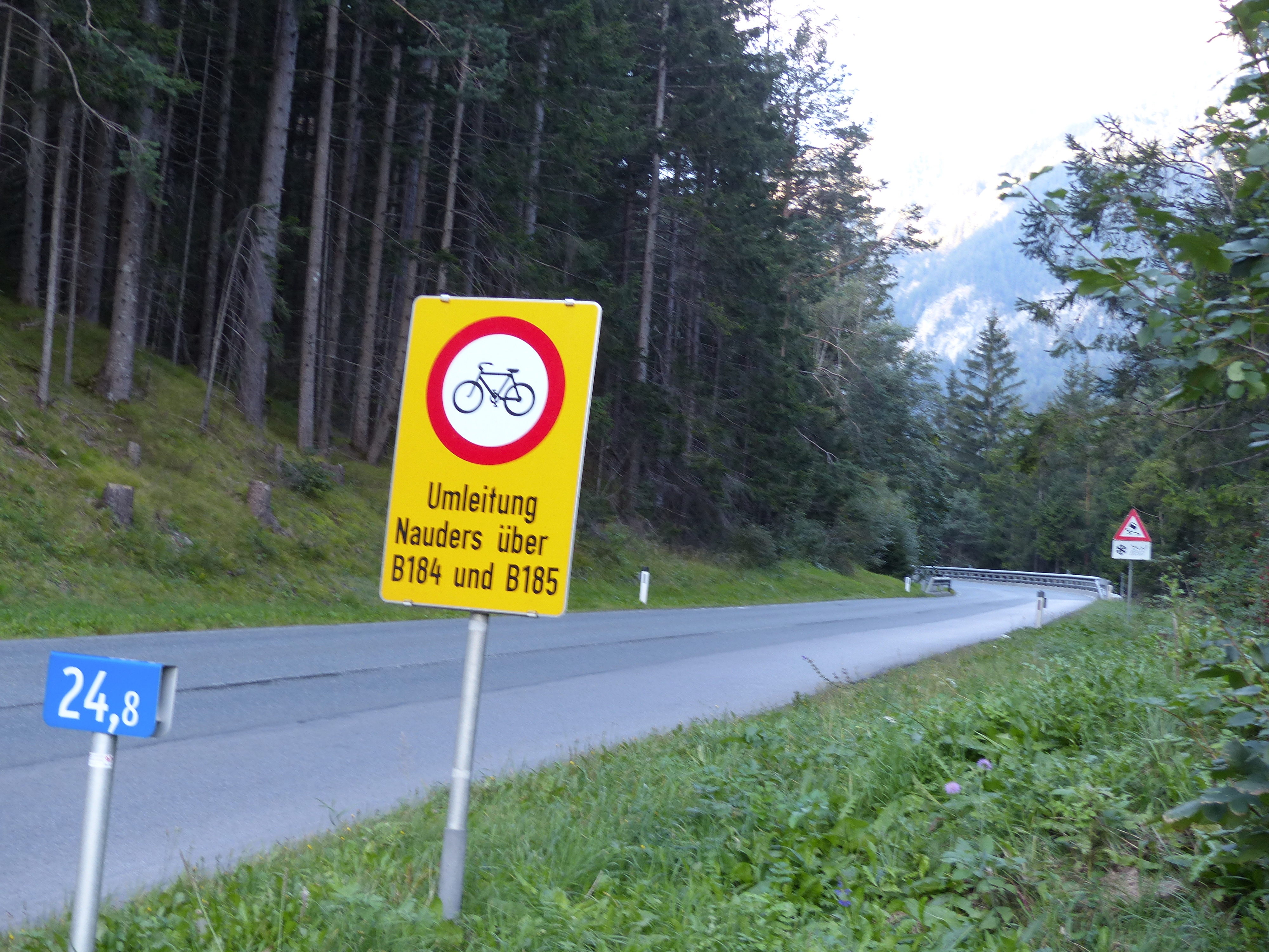 Österreichische Auffahrt zum Reschenpass, Beginn des Fahrradverbotes bei der Einmündung des Intalradwegs an der Kajetanbrücke